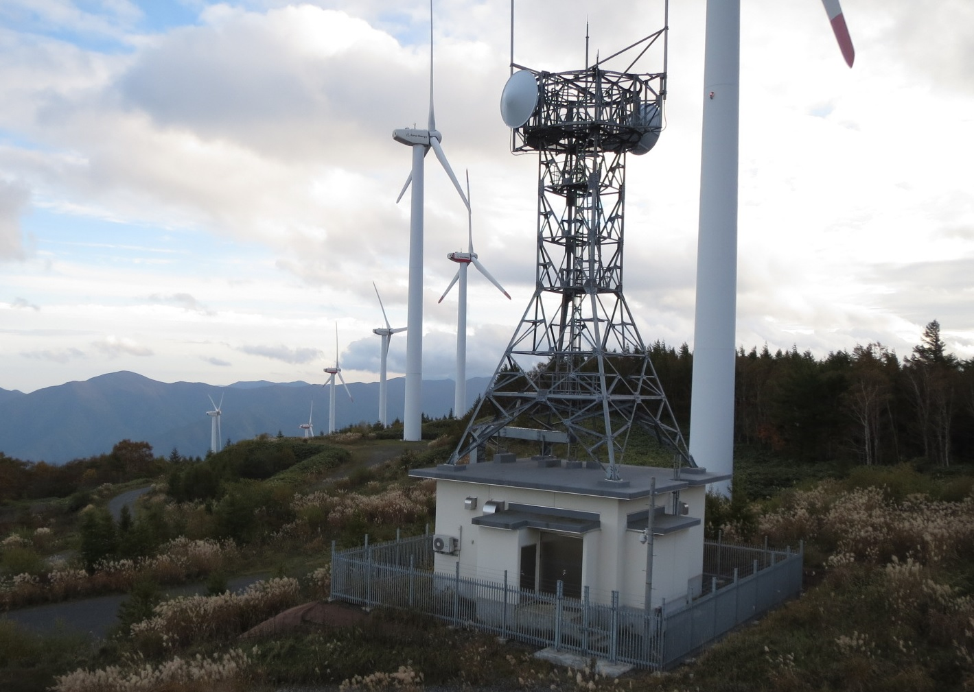 大槌町新山にある中継基地局